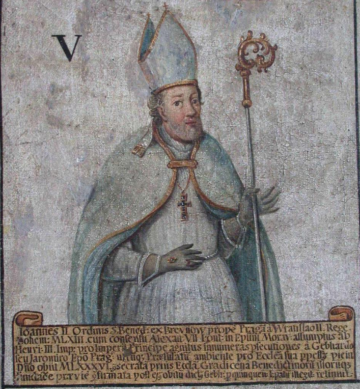 Čtvrtý olomoucký biskup Jan II., Břichatý.